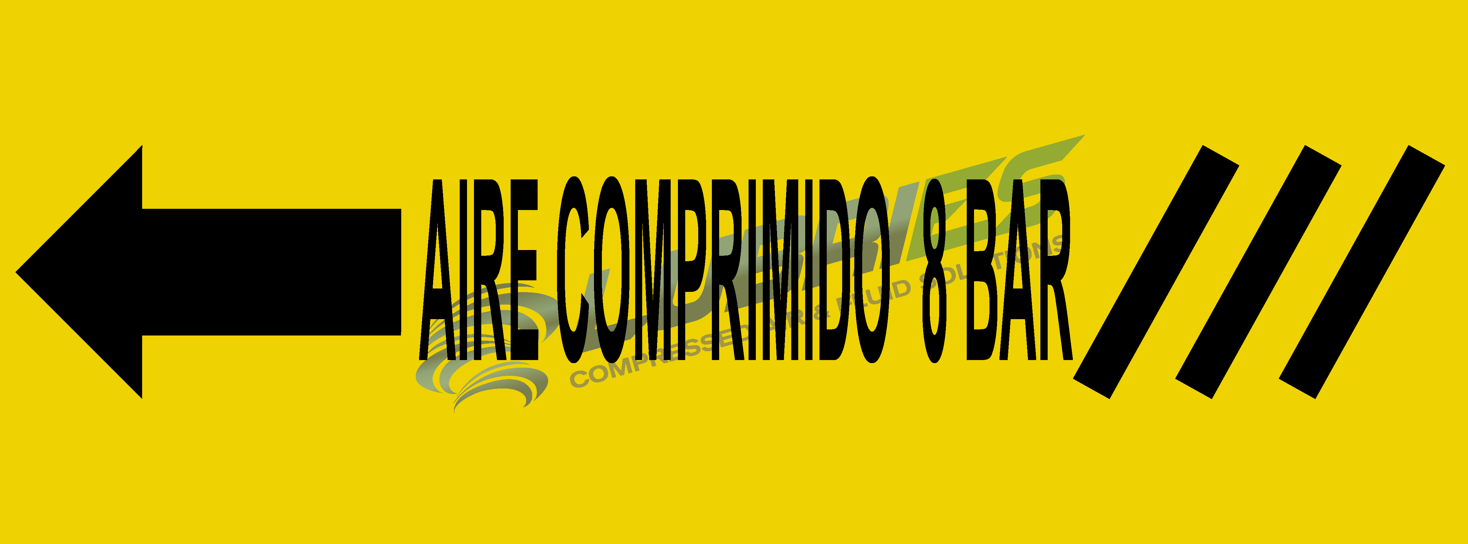 Muestra de etiqueta para red de aire comprimido